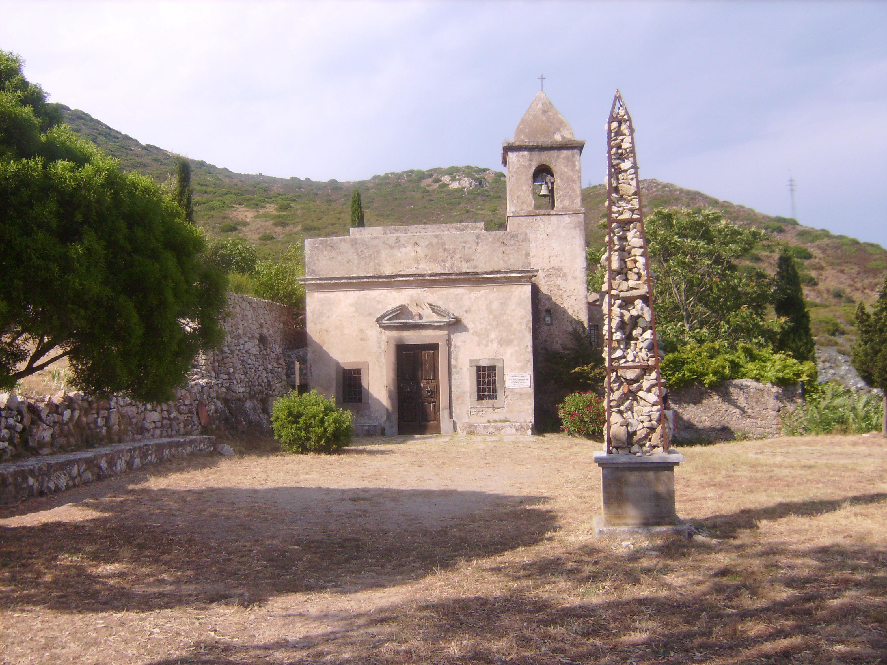 Eremo costruito in epoca romanica, fu dedicato alla santa per frequenti apparizioni di essa a un ragazzo. Davanti si trova un obelisco fatto in pietre per commemorare i caduti.